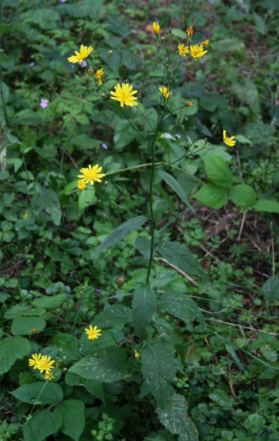 Lapsana communis subsp. intermedia, Korbblütler (Asteraceae) – Georgien/საქართველო: Kleiner Kaukasus, NW Bakuriani/ბაკურიანი, ca. 1650 m s.m.